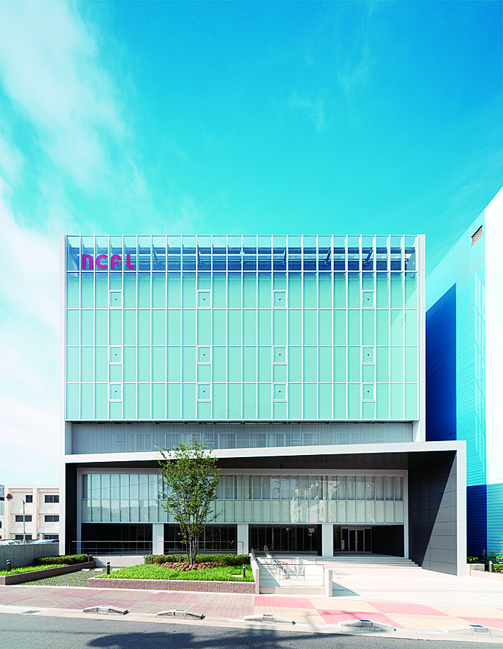 学校の校舎